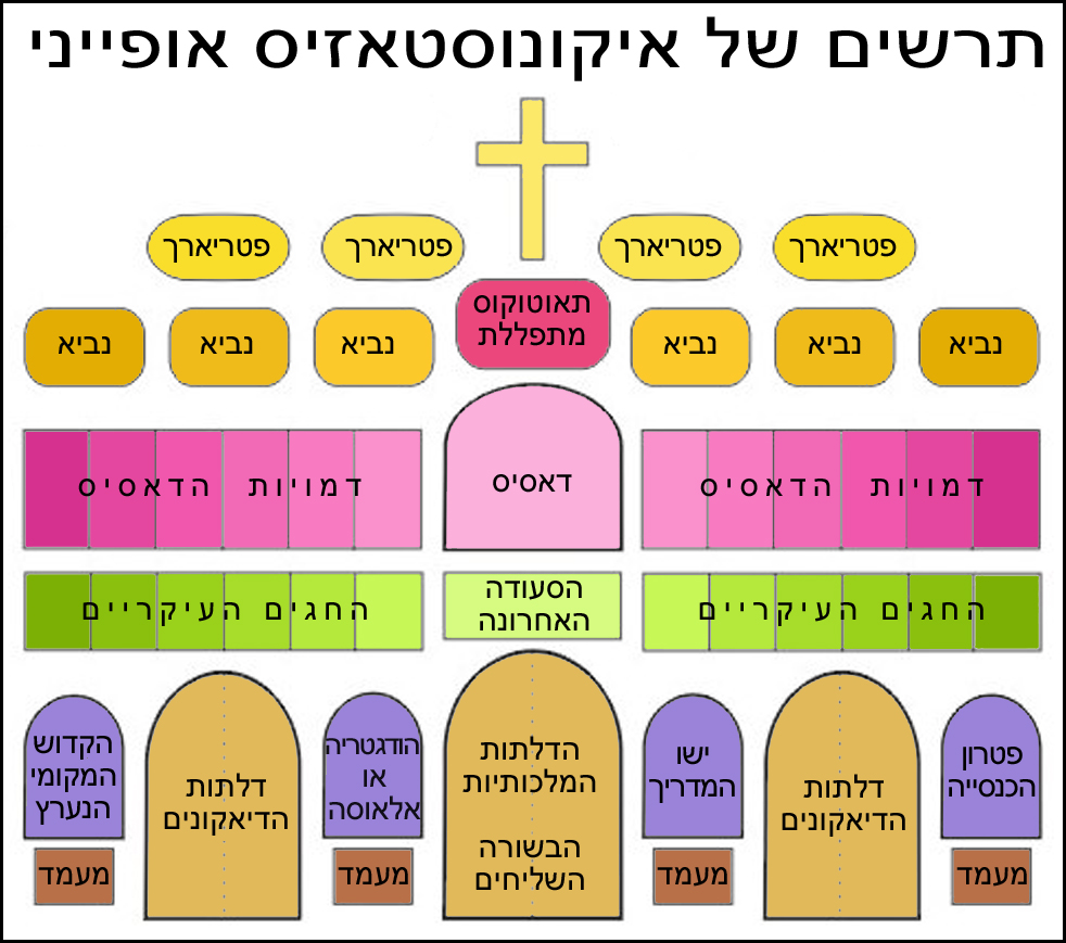 Schemat ikonostasu